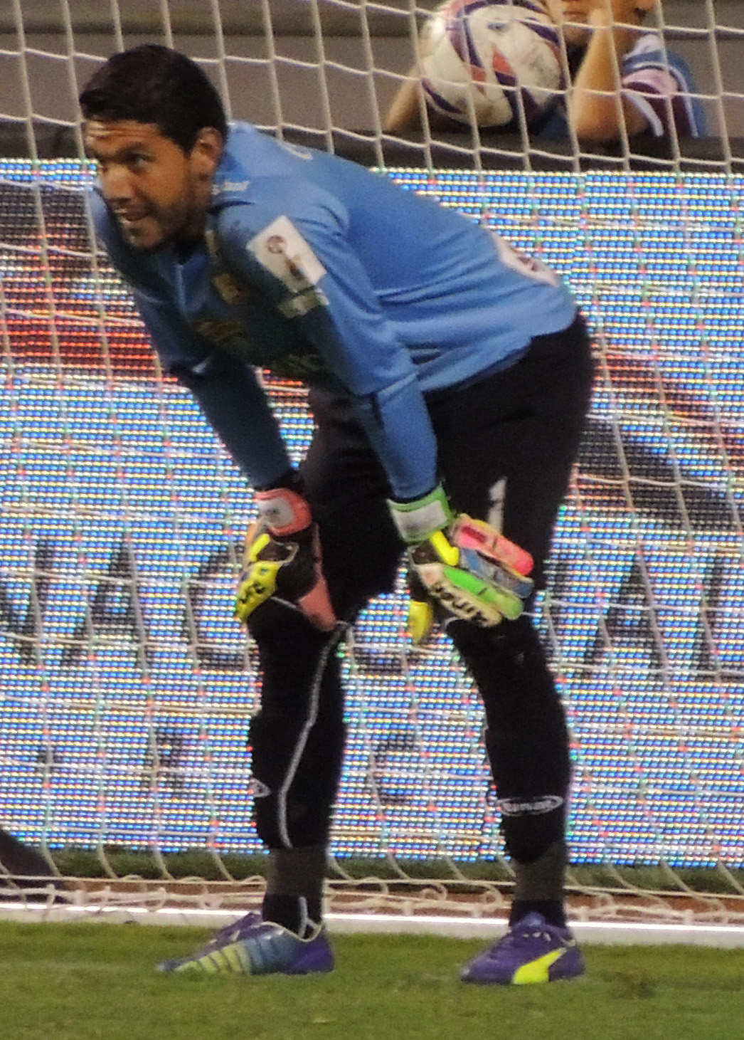 Esta obra de Luis Manuel Madrigal está bajo una licencia de Creative Commons Reconocimiento-CompartirIgual 4.0 Internacional. Para una versión sin logo escriba a